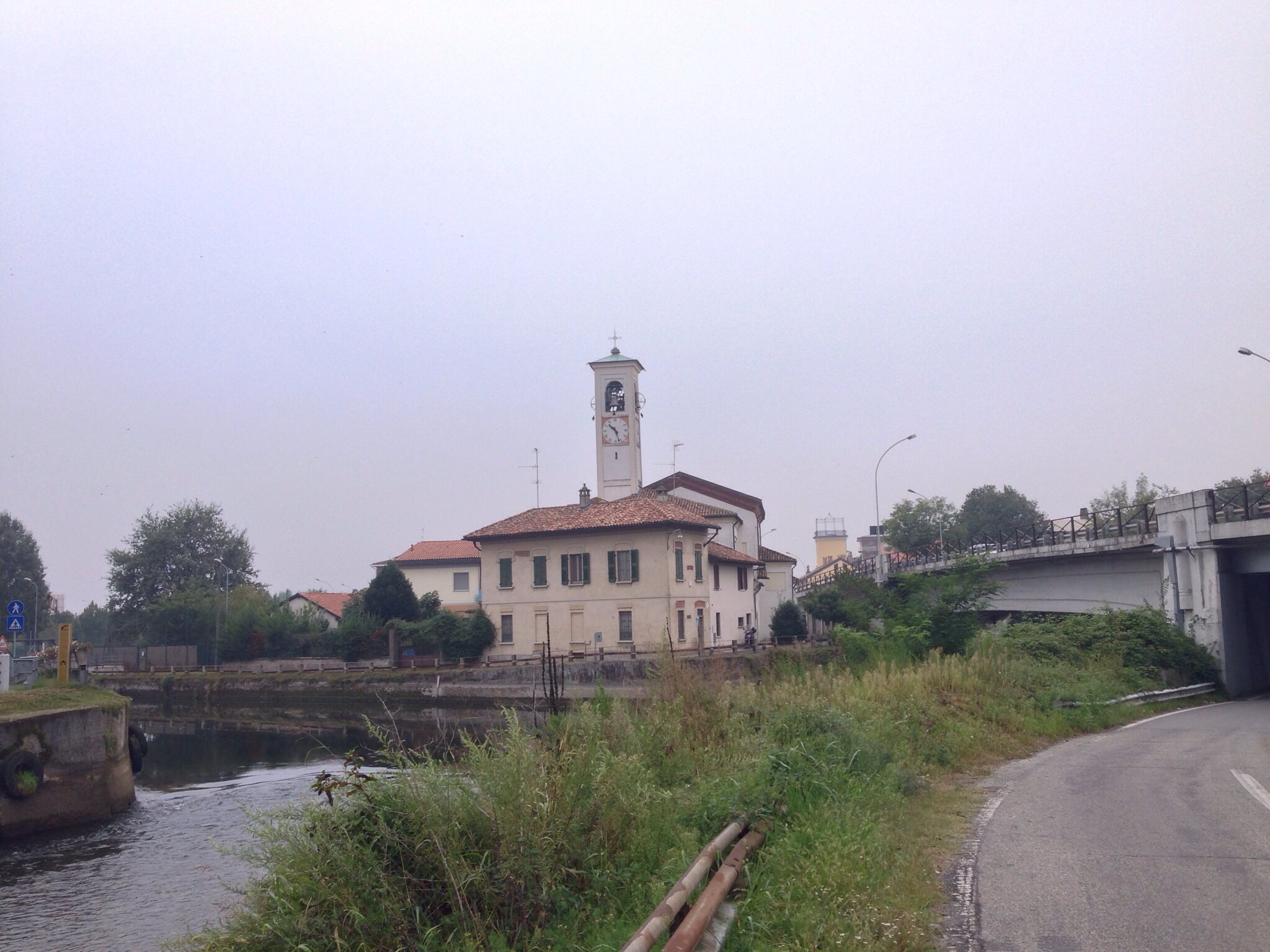 abbiategrasso - SP117